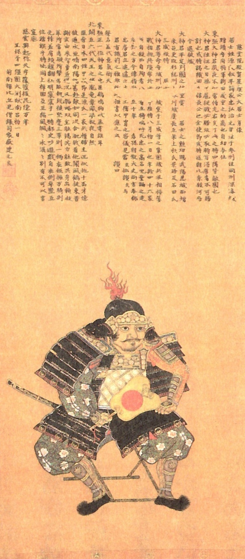 松平家忠の肖像。